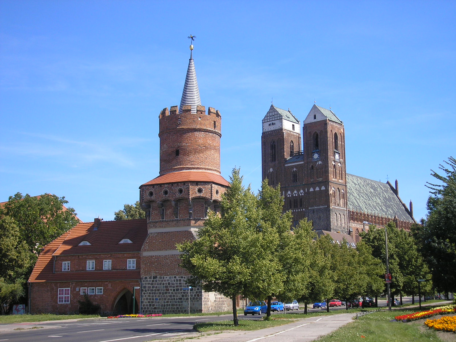 Mitteltor und Marienkirche bilden die bekannteste Stadtansicht in Prenzlau (Brandenburg).